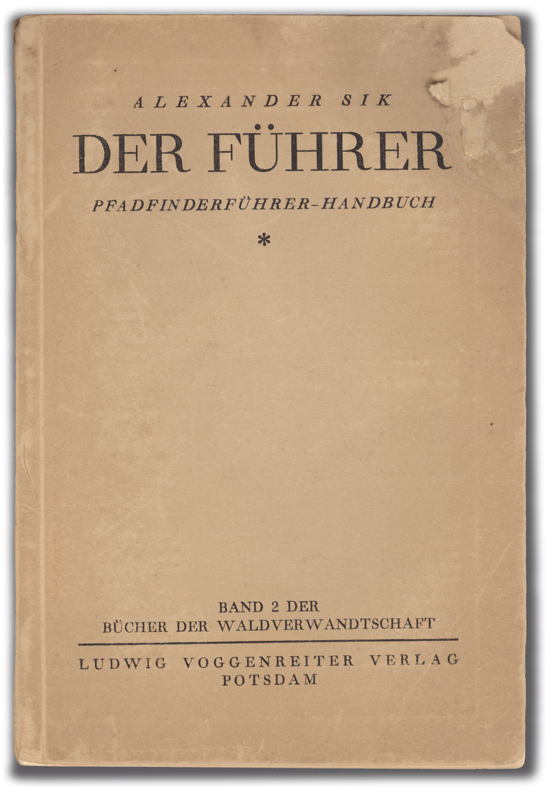 Alexander Sik (Sándor Sík): „Der Führer. Pfadfinderführer-Handbuch.“ Ludwig Voggenreiter Verlag, Potsdam 1929. Das Buch ist eine Übersetzung aus dem Ungarischen. Sándor Sík gehört zu den Gründern der ungarischen Pfadfinderbewegung und bereitet die Baden-Powellsche Arbeitsweise nach ungarischen Gesichtspunkten und eigenen Erkenntnissen auf.